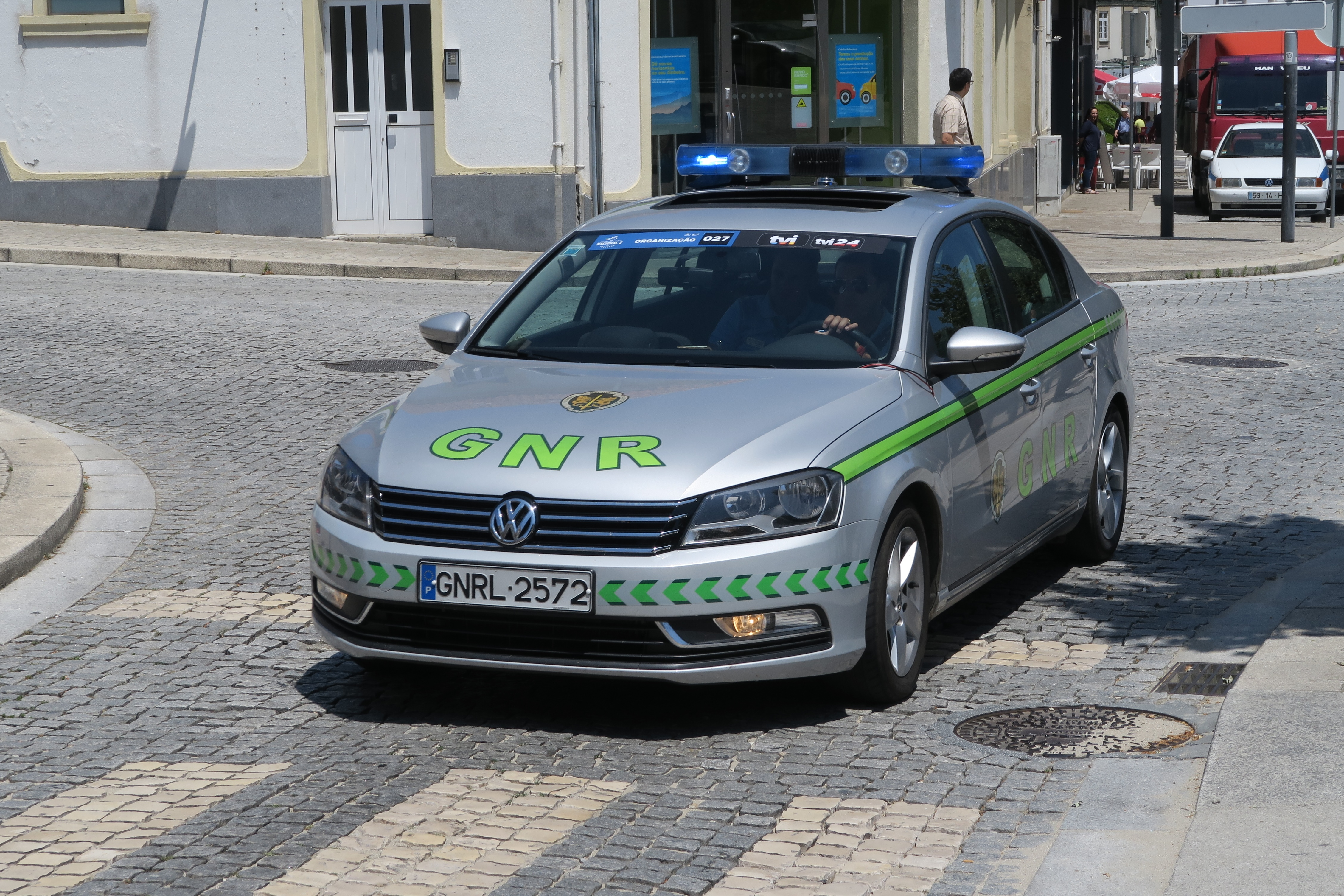 Grande Prémio de Portugal Nacional 2 (2018) Lamego